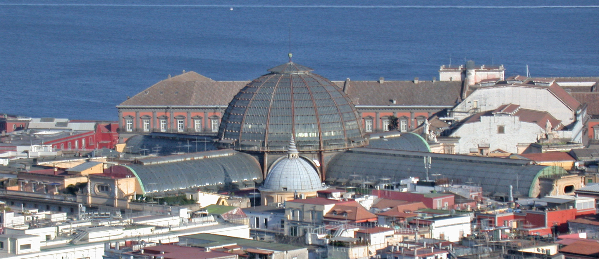 Italia, regione Campania, Napoli, Galleria Umberto I, panorama della copertura in ferro e vetro da presso la certosa di San Martino